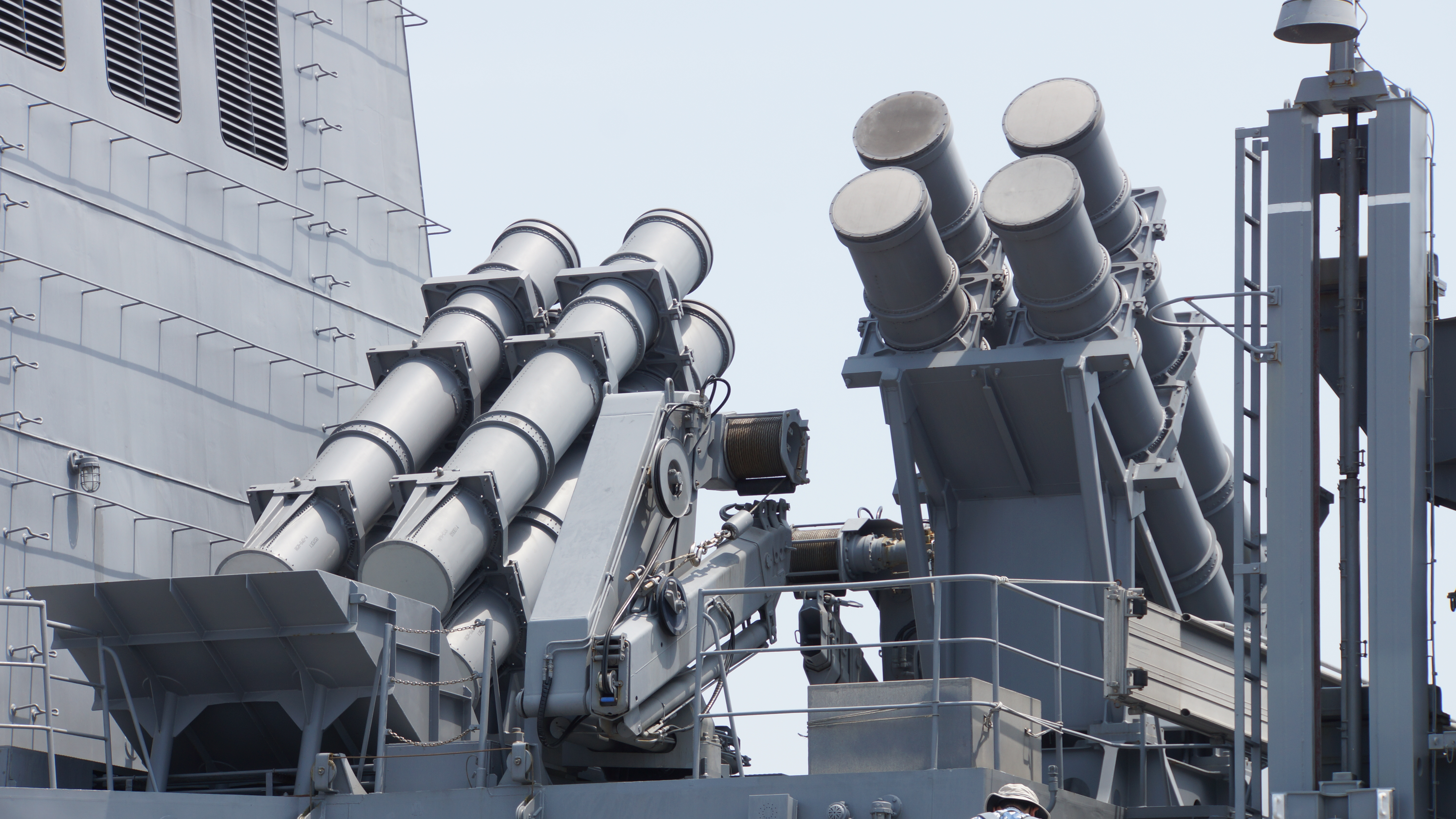 海上自衛隊 護衛艦きりさめ（DD-104） 90式艦対艦誘導弾（SSM-1B）4連装発射筒。2016年5月15日 大阪港桜島岸壁にて。